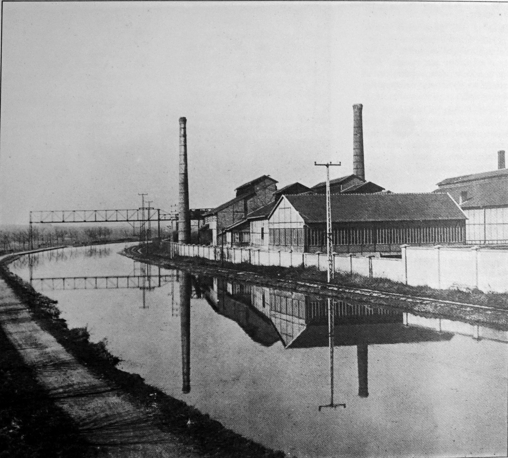 sur une vue ancienne.